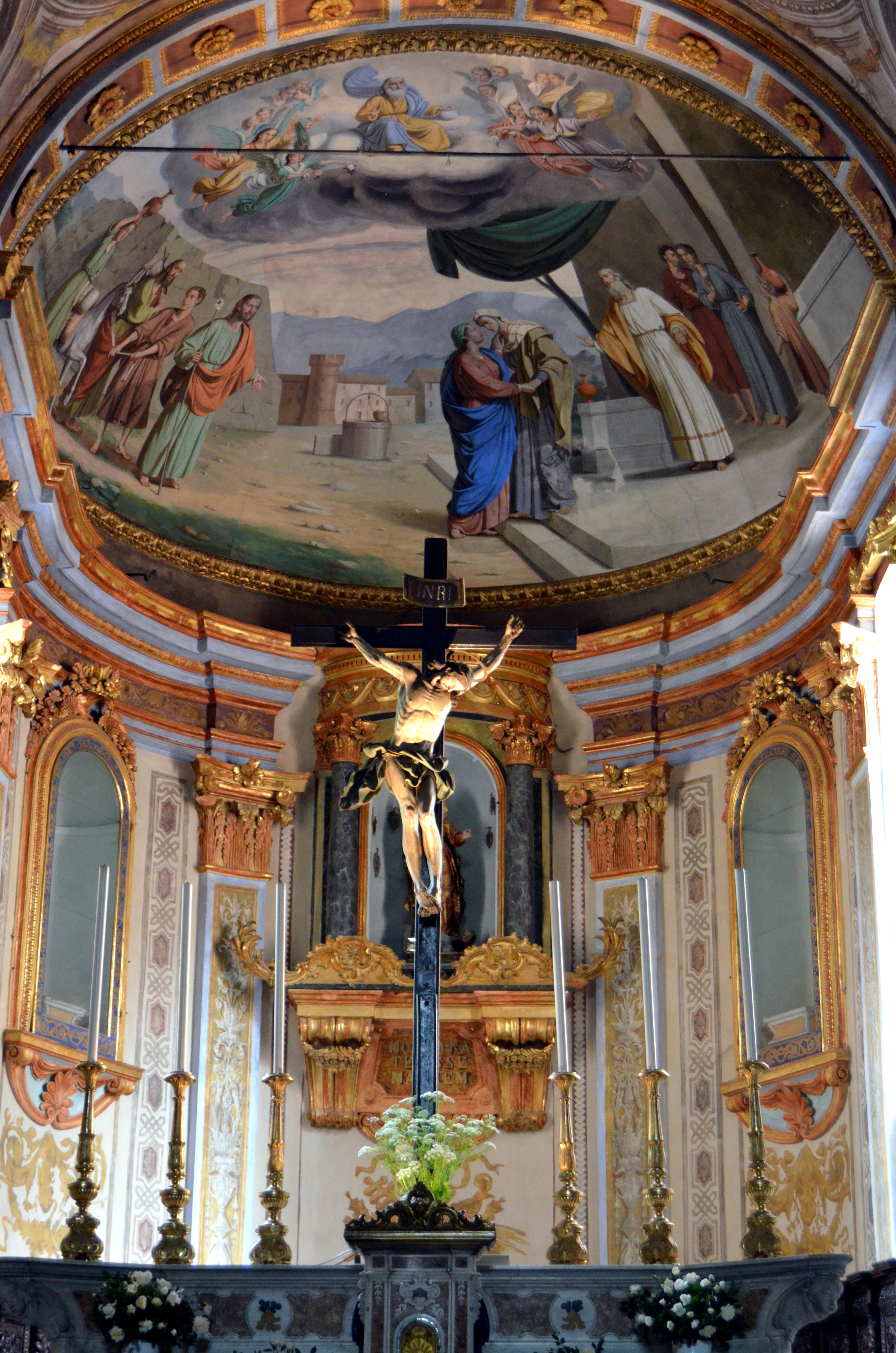 Tracce delle medievali mura di Levanto, Liguria, Italia Altare maggiore e decorazioni pittoriche della chiesa di San Giovanni Battista, Varese Ligure, Liguria, Italia